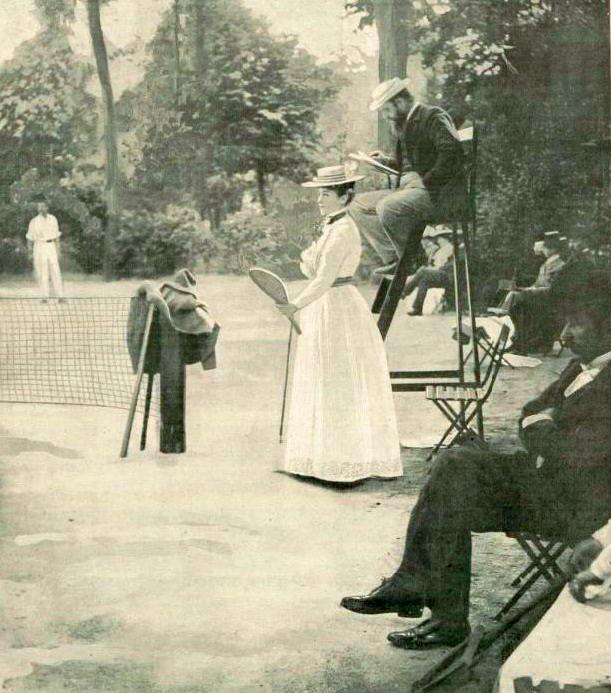 Le lawn-tennis aux JO de 1900, à la société des sports de l'ile de Puteaux.